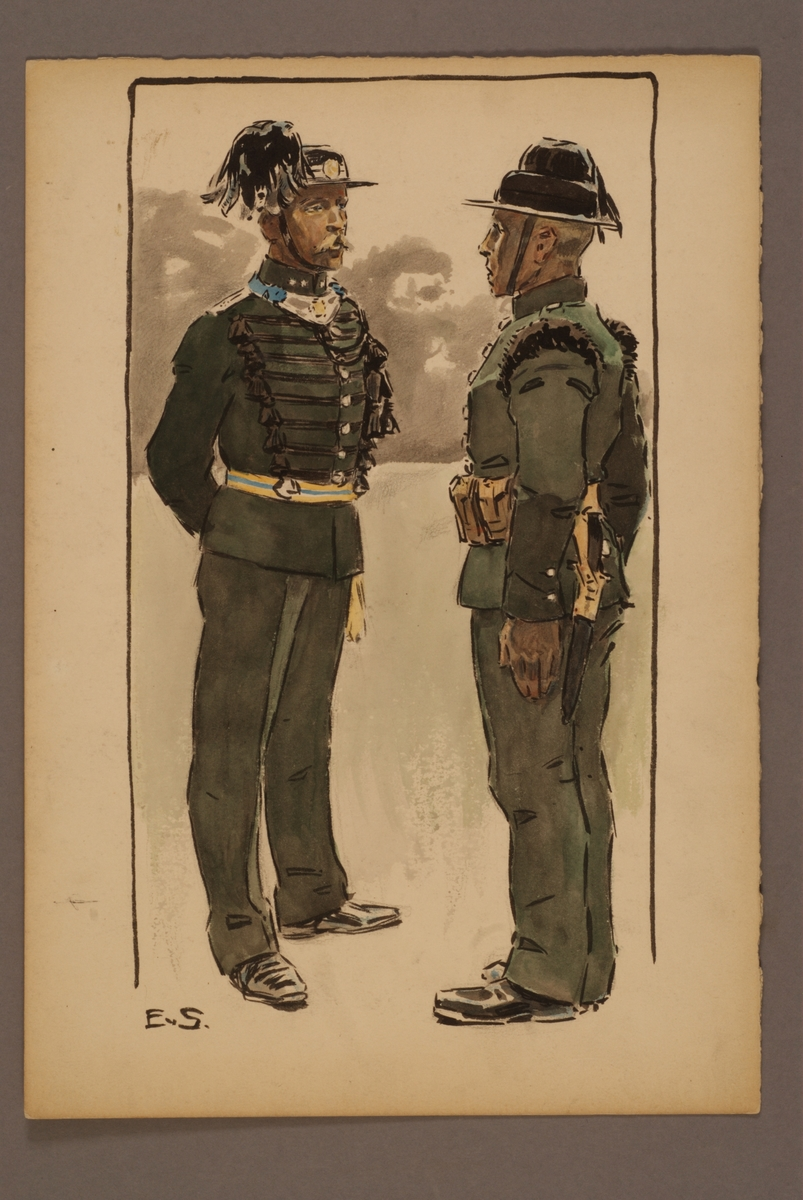 Plansch med uniform för Värmlands fältjägare, ritad av Einar von Strokirch. Tillhör Armemuseums arkiv.